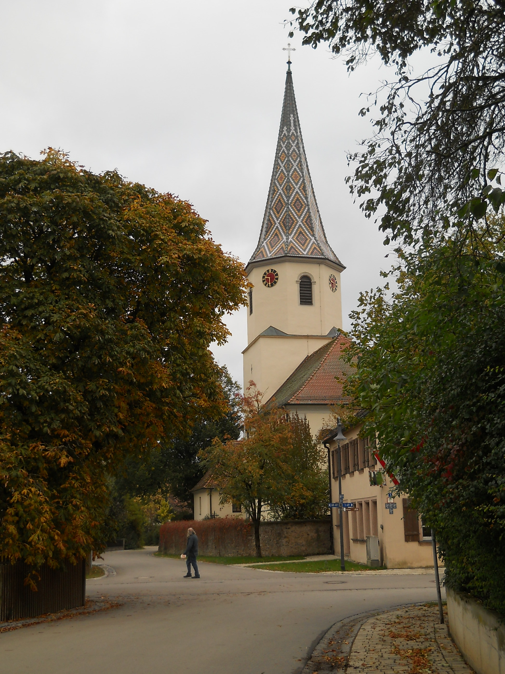 Windsfeld, Ortsteil von Dittenheim im mittelfränkischen Landkreis Weißenburg-Gunzenhausen, Evang.-luth. Pfarrkirche St. Gangolf